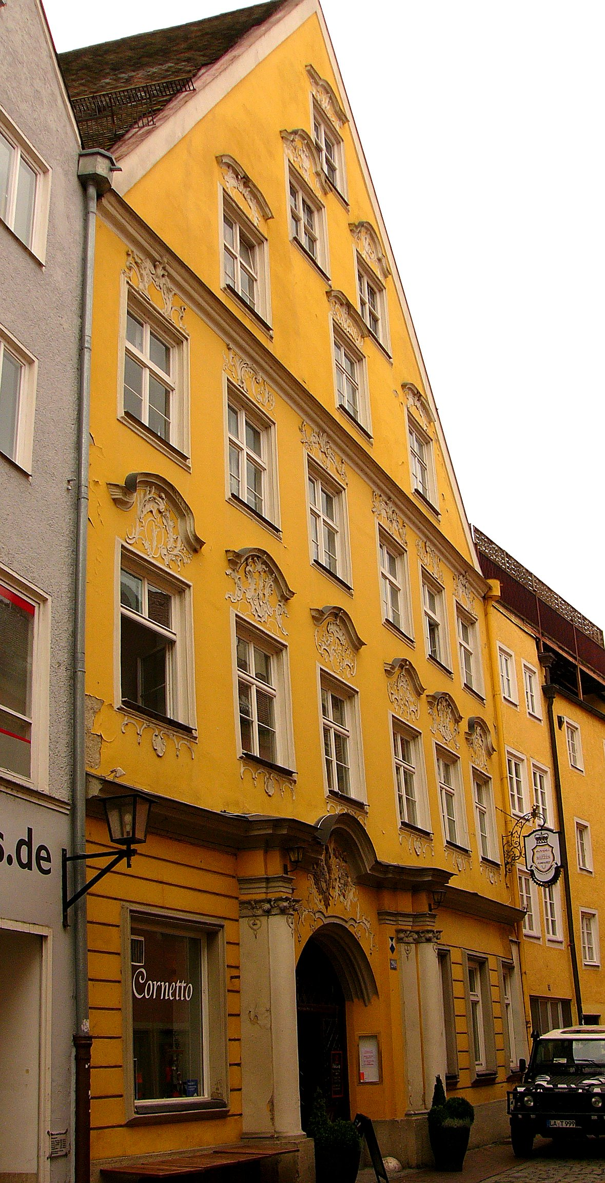 Ehem. Palais Pettenkofer; dann Hofbräuhaus, stattlicher dreigeschossiger Bau zu sechs Achsen, reicher Fassadenschmuck, im Kern 1. Hälfte 17 Jahrhundert, sonst um 1770This is a photograph of an architectural monument.